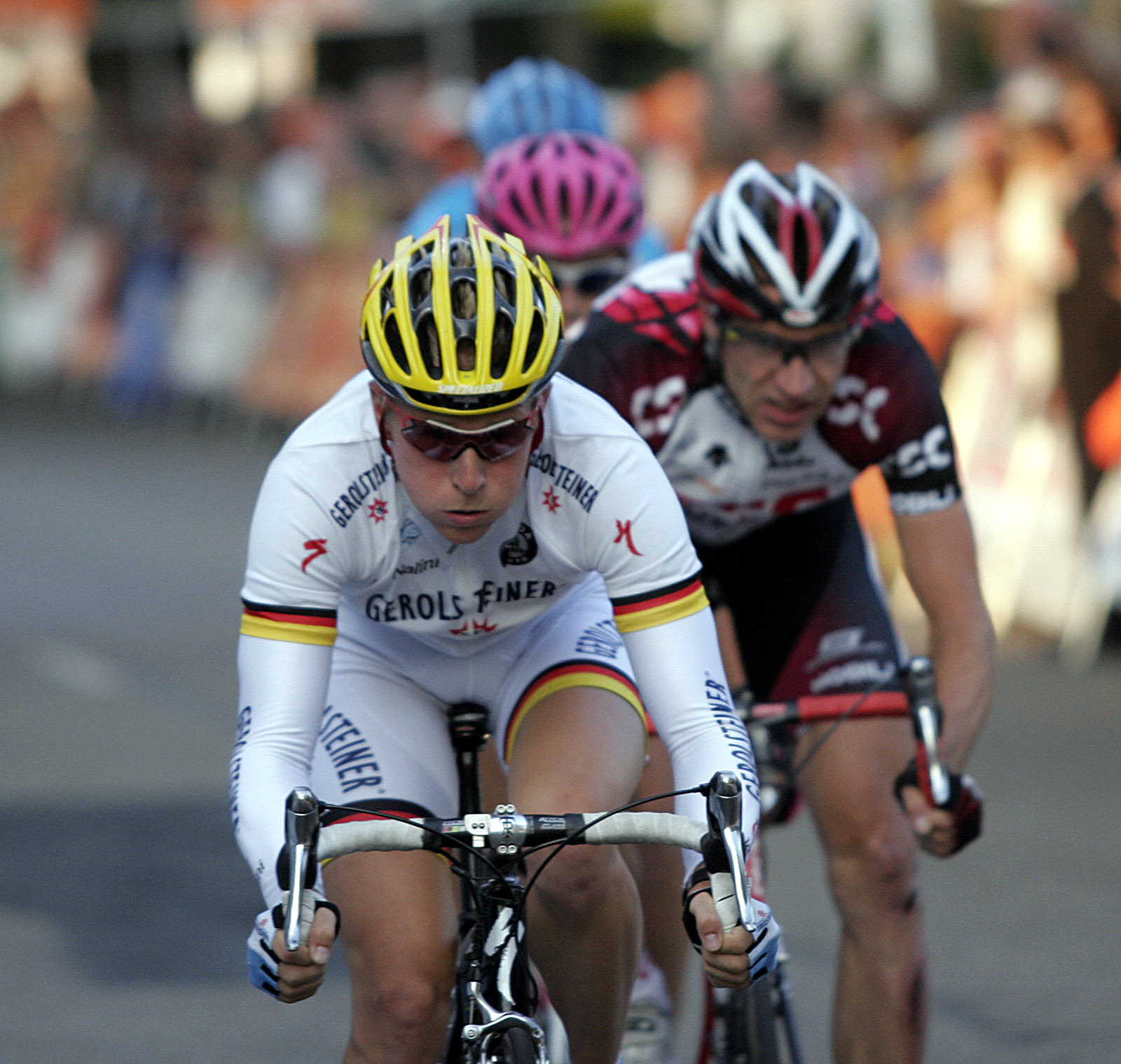 Fabian Wegmann im Trikot des Deutschen Meisters beim Entega Grand Prix in Lorsch (Südhessen). Dahinter Jens Voigt (CSC Tiscali)